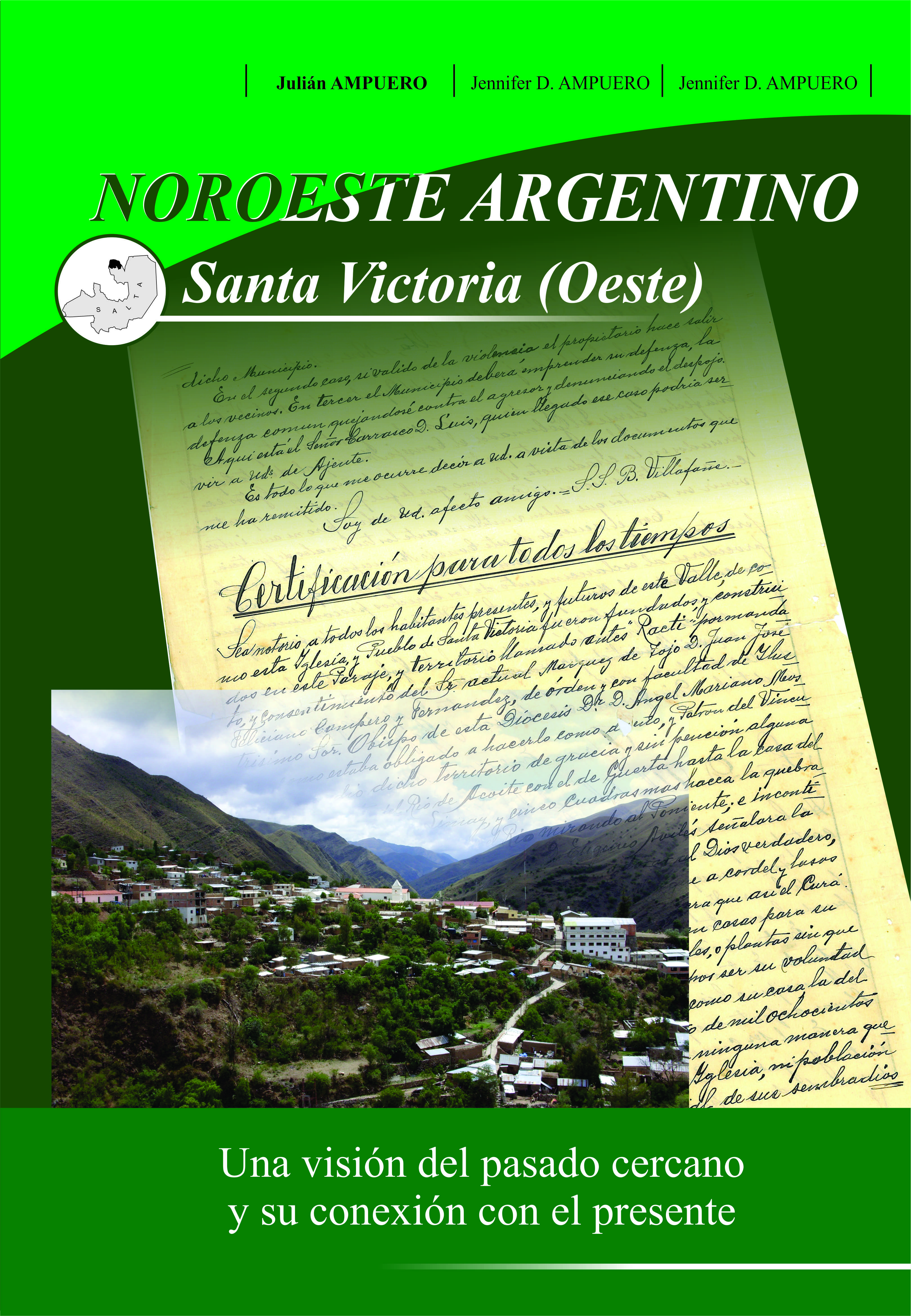 TAPA DEL LIBRO - NOROESTE ARGENTINO - SANTA VICTORIA OESTE "Una Visión del pasado cercano y su conexión con el presente"